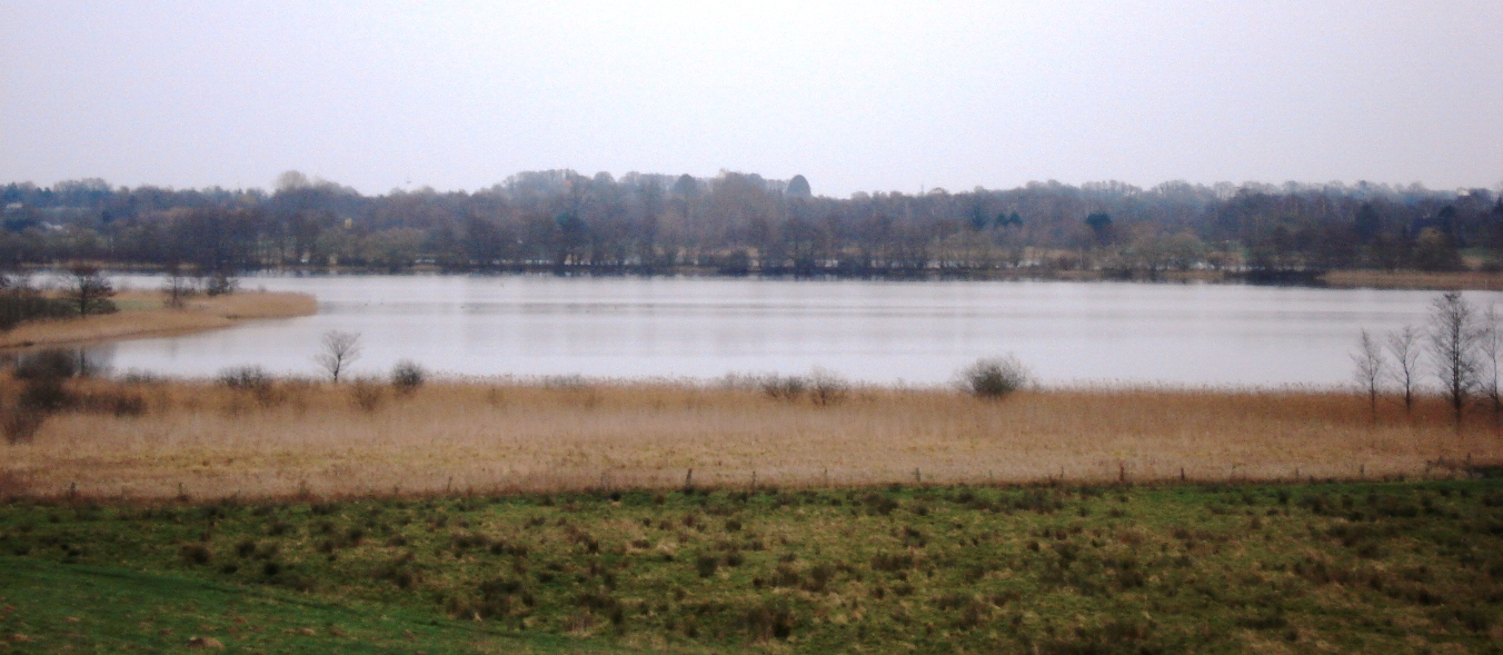 Middelburger See - Süd